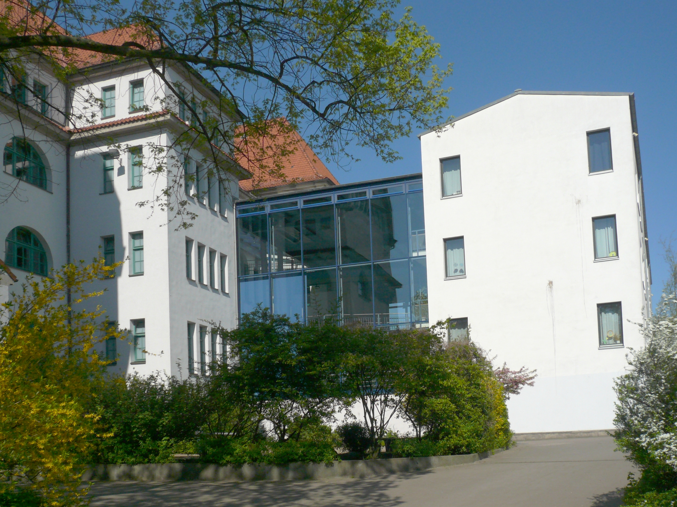 Gesamtschule Eppendorf -Architekt: Albert Erbe- Neubau